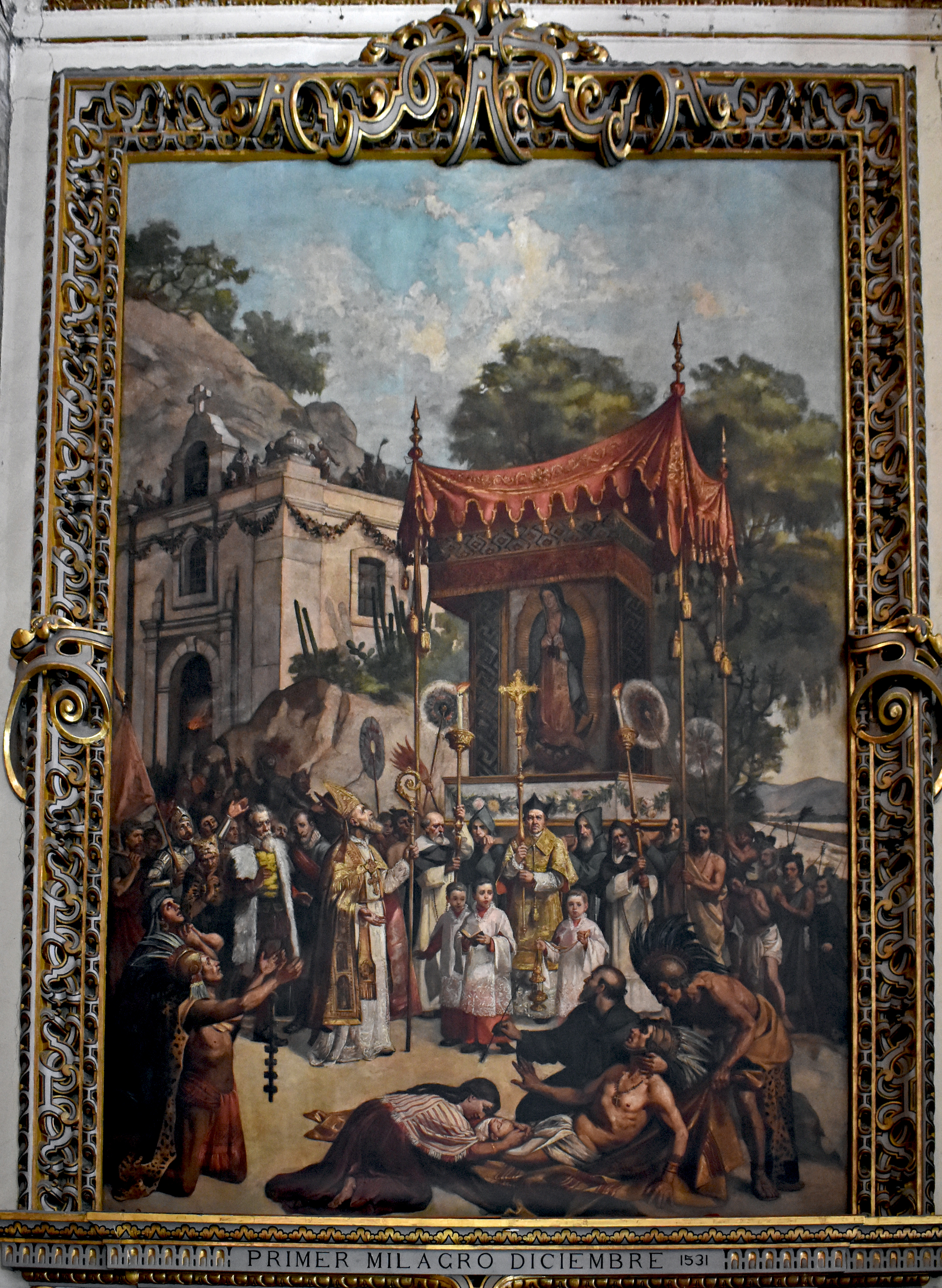 Pintura titulada "Primer milagro diciembre 1531". Autor Gonzalo Carrasco, 1895. Óleo sobre tela, 5.20 x 8.00 m. Interior de la Antigua Basílica de Guadalupe. Conjunto Villa de Guadalupe